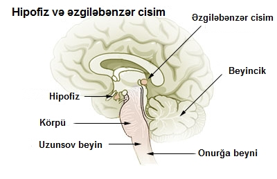 İnsanın normal anatomiyası - daxili sekresiya vəziləri: hipofiz və əzgiləbənzər cisim (epifiz)